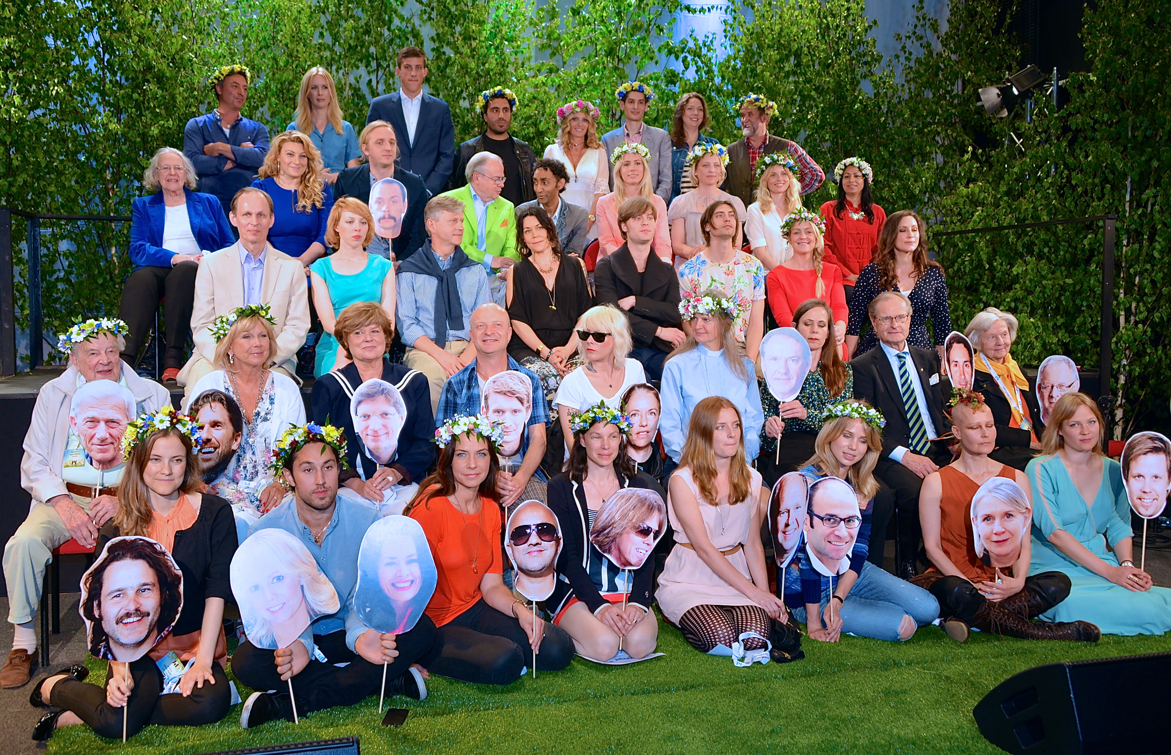 Årets Sommarvärdar presenteras av Sveriges Radio i radiohuset den 29 maj 2013.